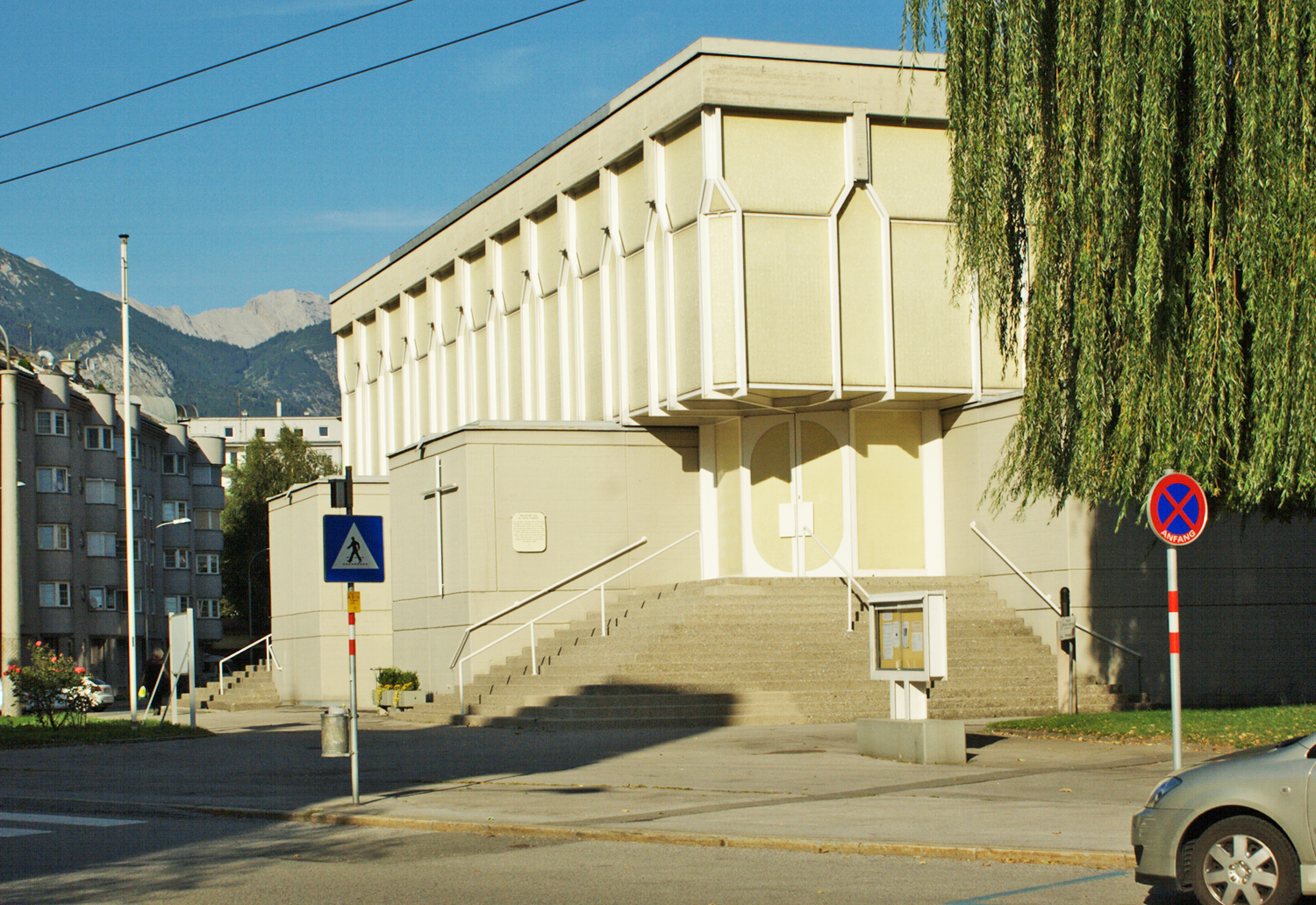 Kath. Pfarrkirche hl. Petrus Canisius und Pfarramt